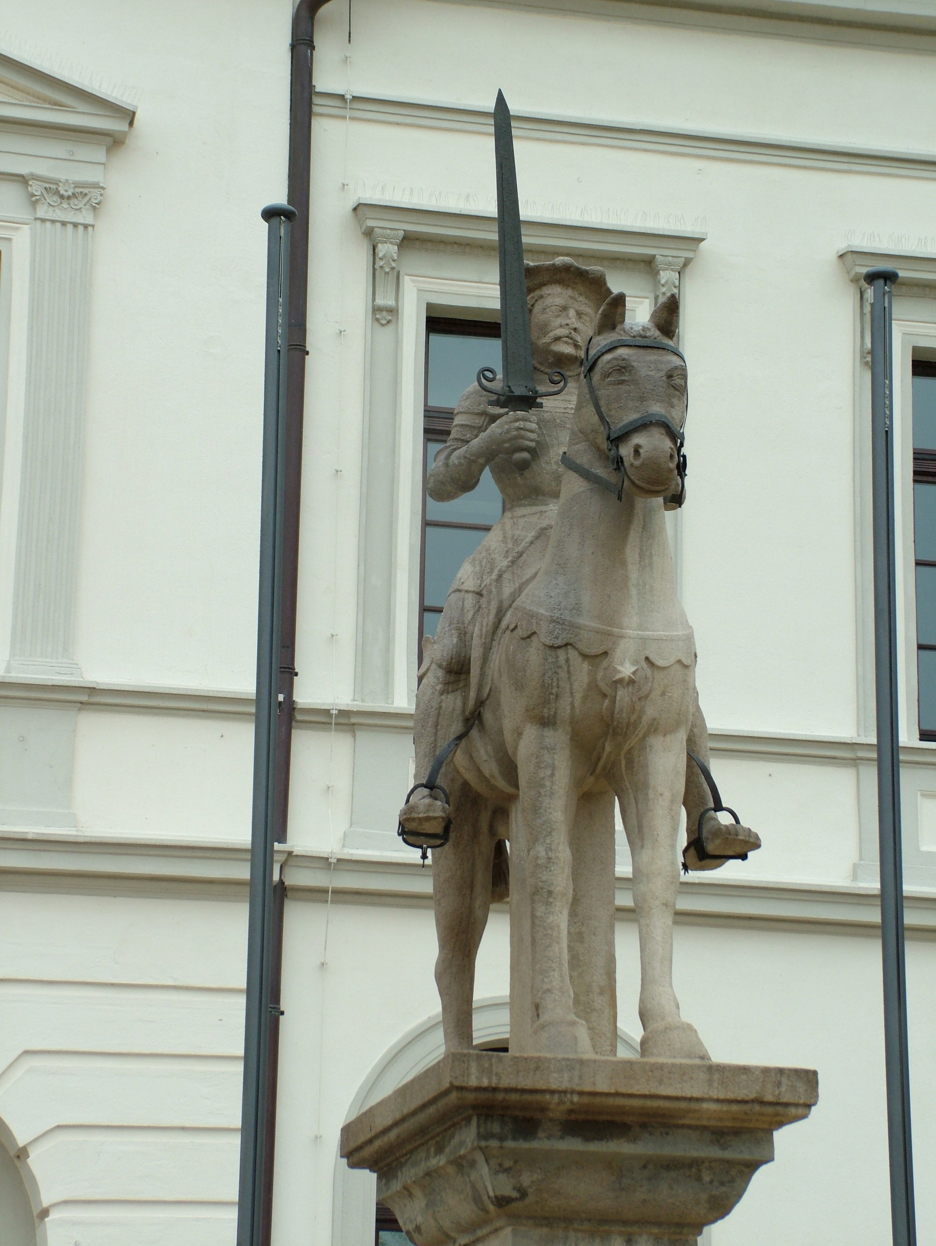 Haldensleben, Sachsen-Anhalt, Deutschland, der Roland vor dem Rathaus